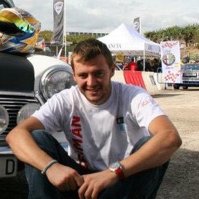 Retrato de Germán Sánchez Flor